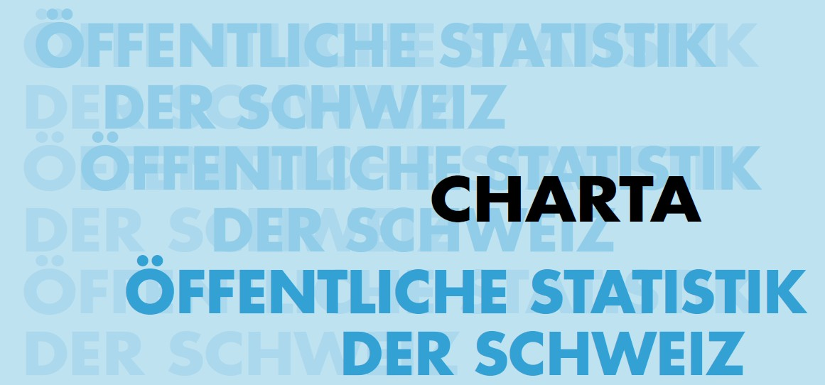 Titelbild Publikation Charta öffentliche Statistik der Schweiz